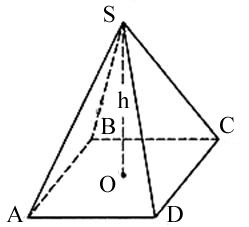 Наглядное пособие по вычислению объема пирамиды.